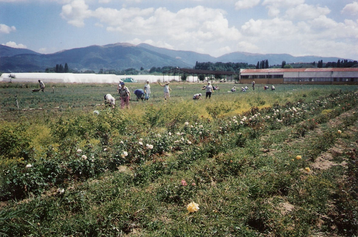 roses pickers in roses vally,kazanlak,bulgaria